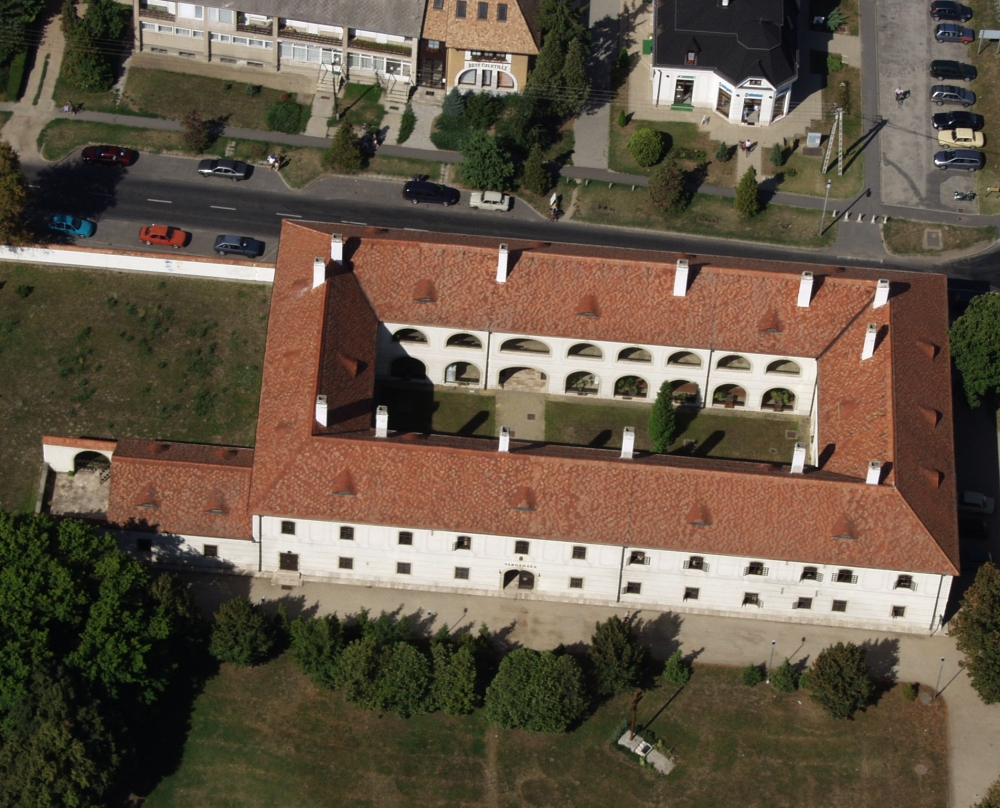 Fertődi Muzsikaház. Itt van a zeneiskola, a Haydn emlékszoba, a polgármesteri hivatal, és a könyvtár is.- Címe: 9431 Fertőd, Madách sétány 1.